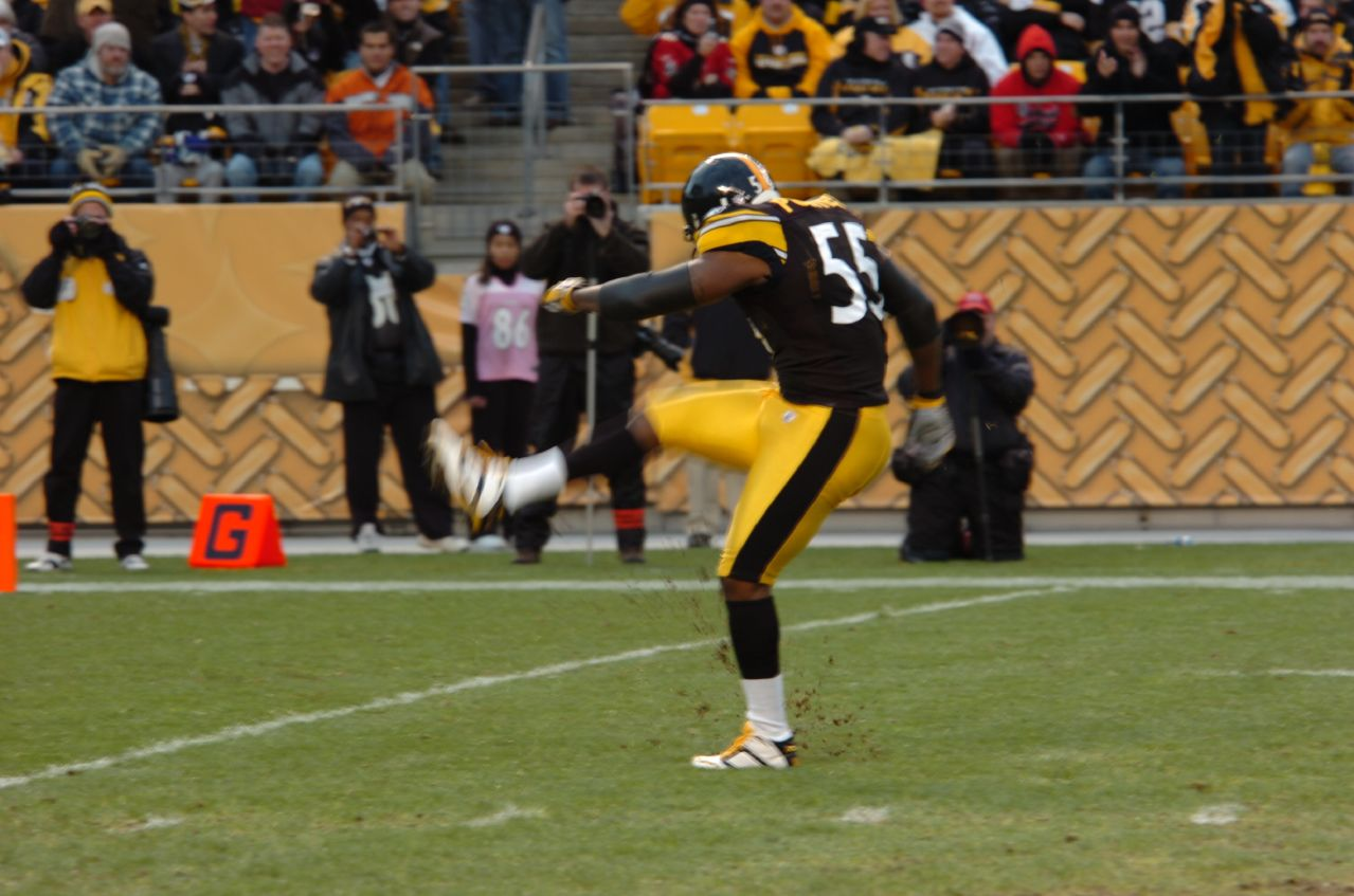 Pittsburgh Steelers linebacker Joey Porter - December 3, 2006